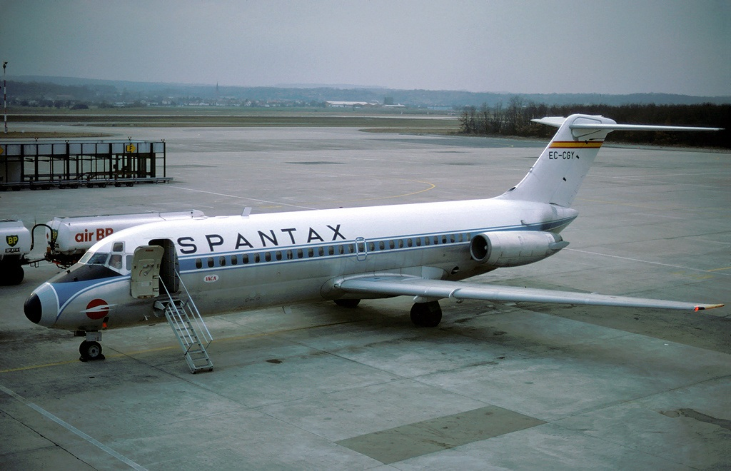 Douglas DC-9-14 Basle / Mulhouse - Euro (BSL / MLH / LFSB) France, March 1980 EC-CGY (cn 45696/2)